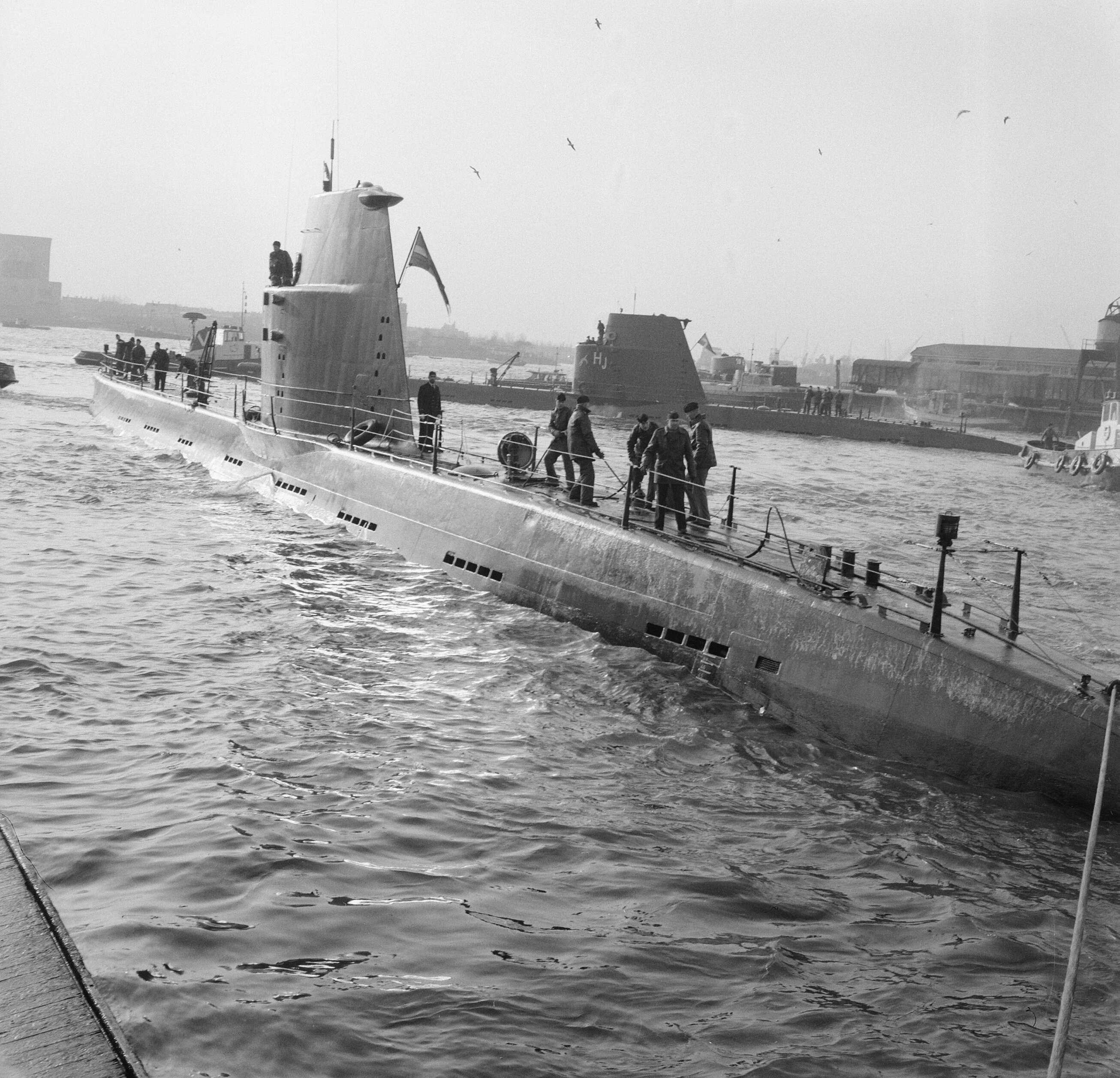 Collectie / Archief : Fotocollectie Anefo Reportage / Serie : [ onbekend ] Beschrijving : Bezoek Zweedse onderzeeboten aan Rotterdam Datum : 25 januari 1961 Locatie : Rotterdam, Zuid-Holland Trefwoorden : bezoeken, onderzeeboten Fotograaf : Behrens, Herbert / Anefo Auteursrechthebbende : Nationaal Archief Materiaalsoort : Negatief (zwart/wit) Nummer archiefinventaris : bekijk toegang 2.24.01.03 Bestanddeelnummer : 912-0175